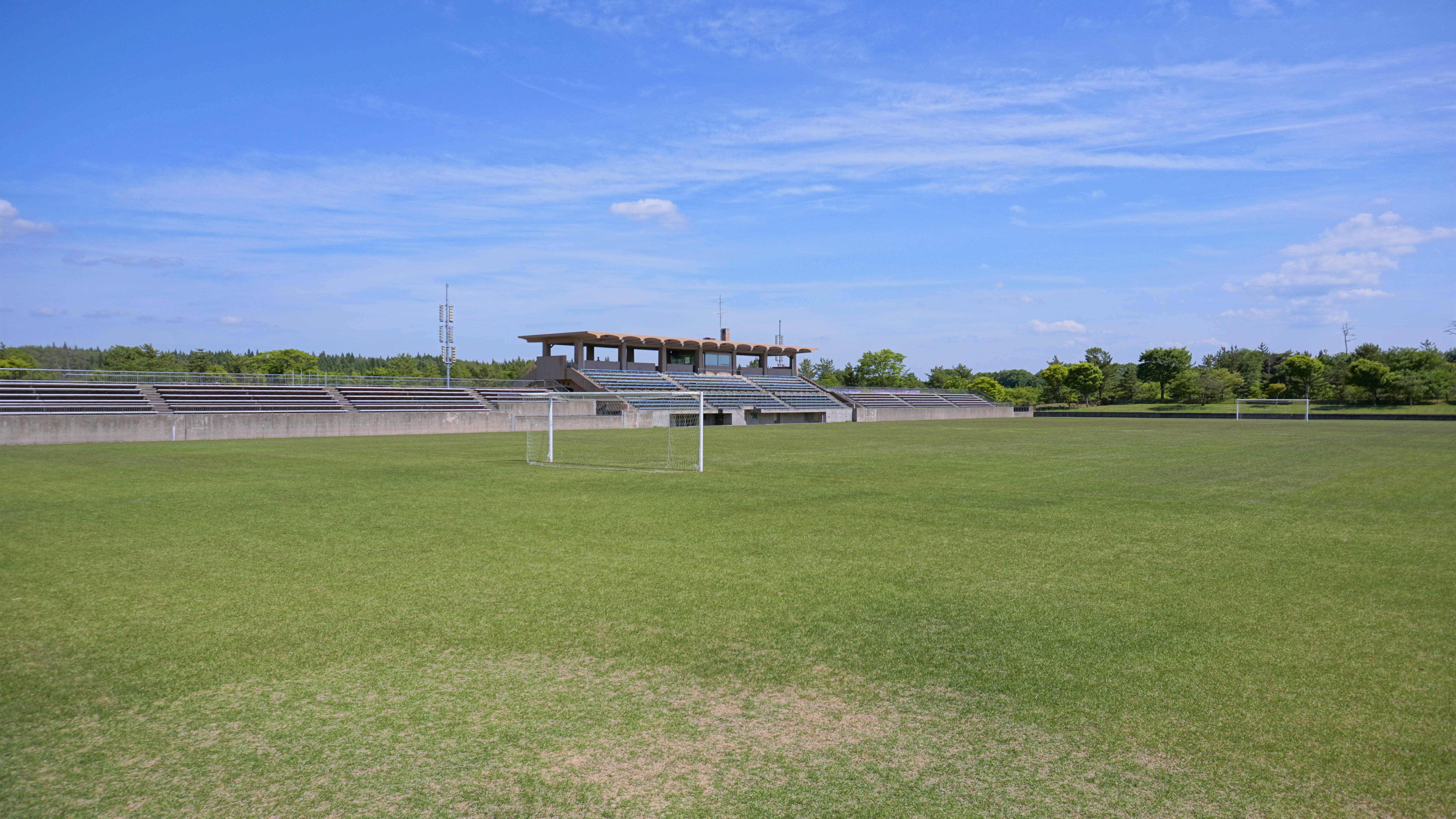 秋田県立中央公園球技場。メインスタンドとコンコースを共有する2面のピッチが東西背中合わせに配置されている。画像は西側フィールド